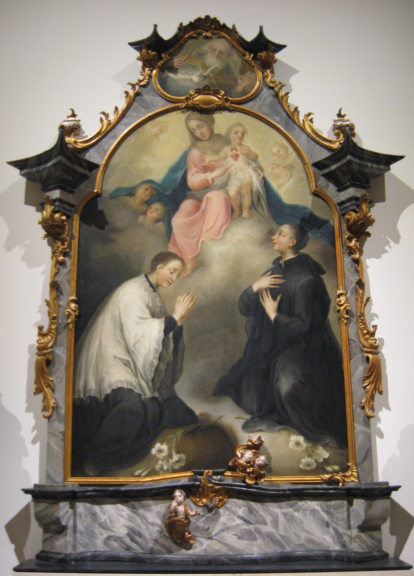 Gemälde Gösers aus Bad Krozingen im Augustinermuseum Freiburg